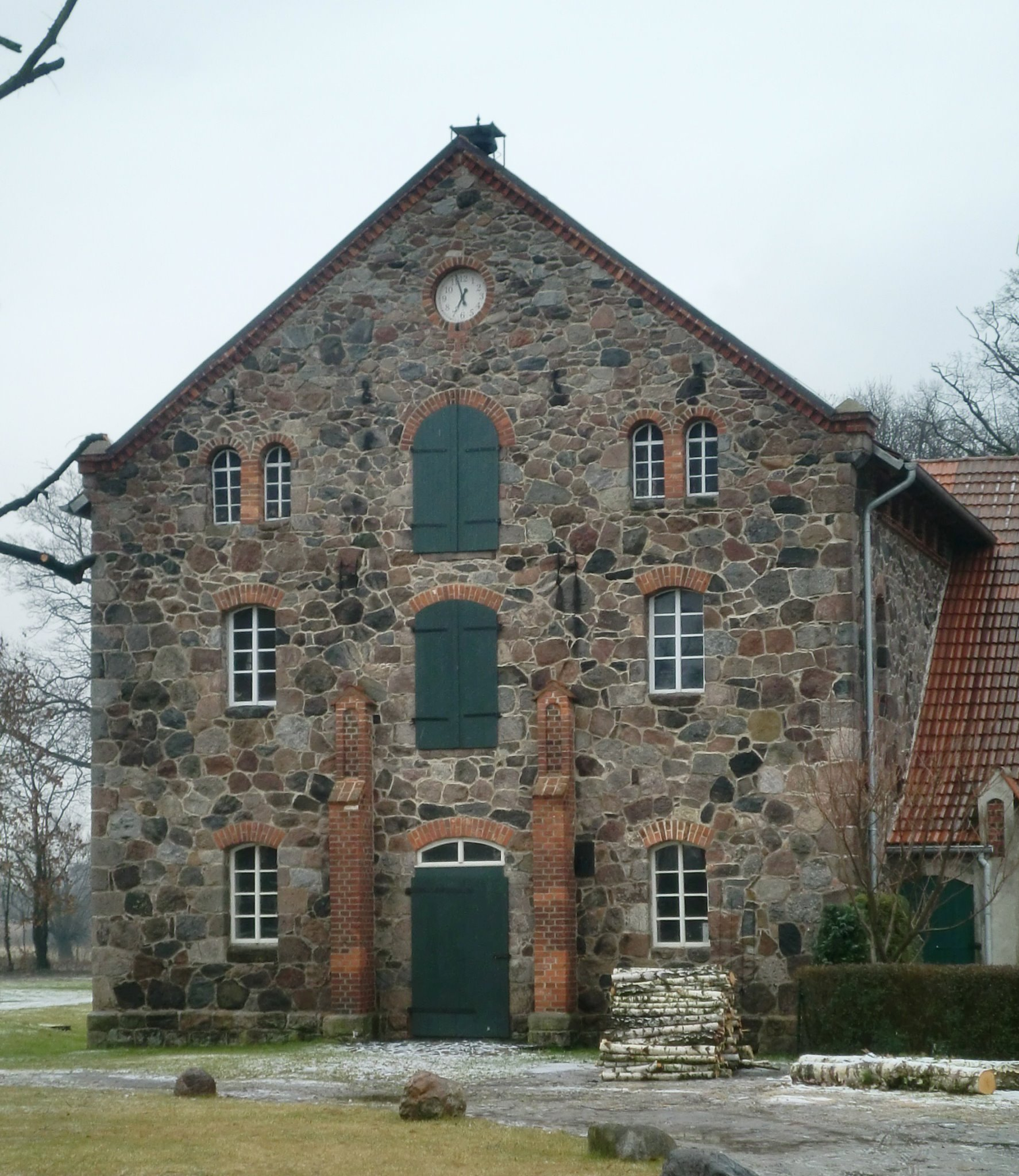 Gebäude des Gutshofes Ottersburg